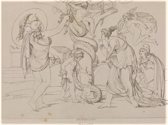 Illustration zur Mythologie (aus der 'Argonautensage')